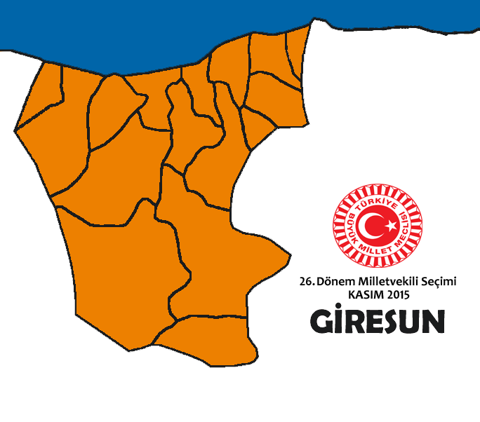 Kasım 2015 seçimleri